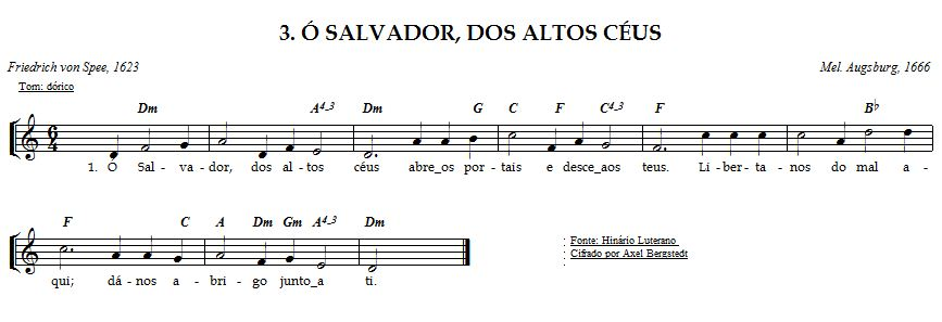 Hino dórico do século XVII de Friedrich von Spee